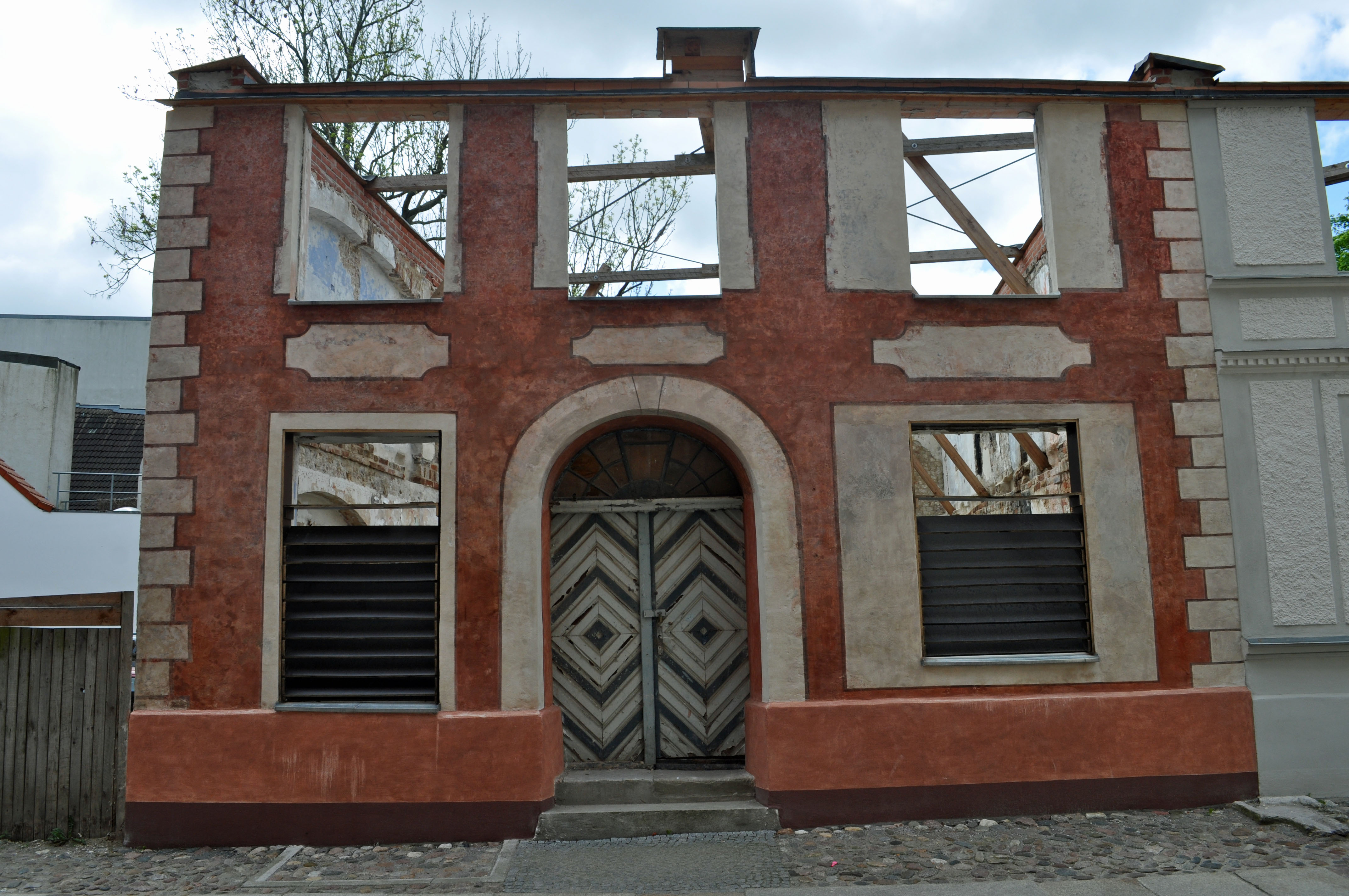 Gebäude in Stralsund, siehe Dateiname